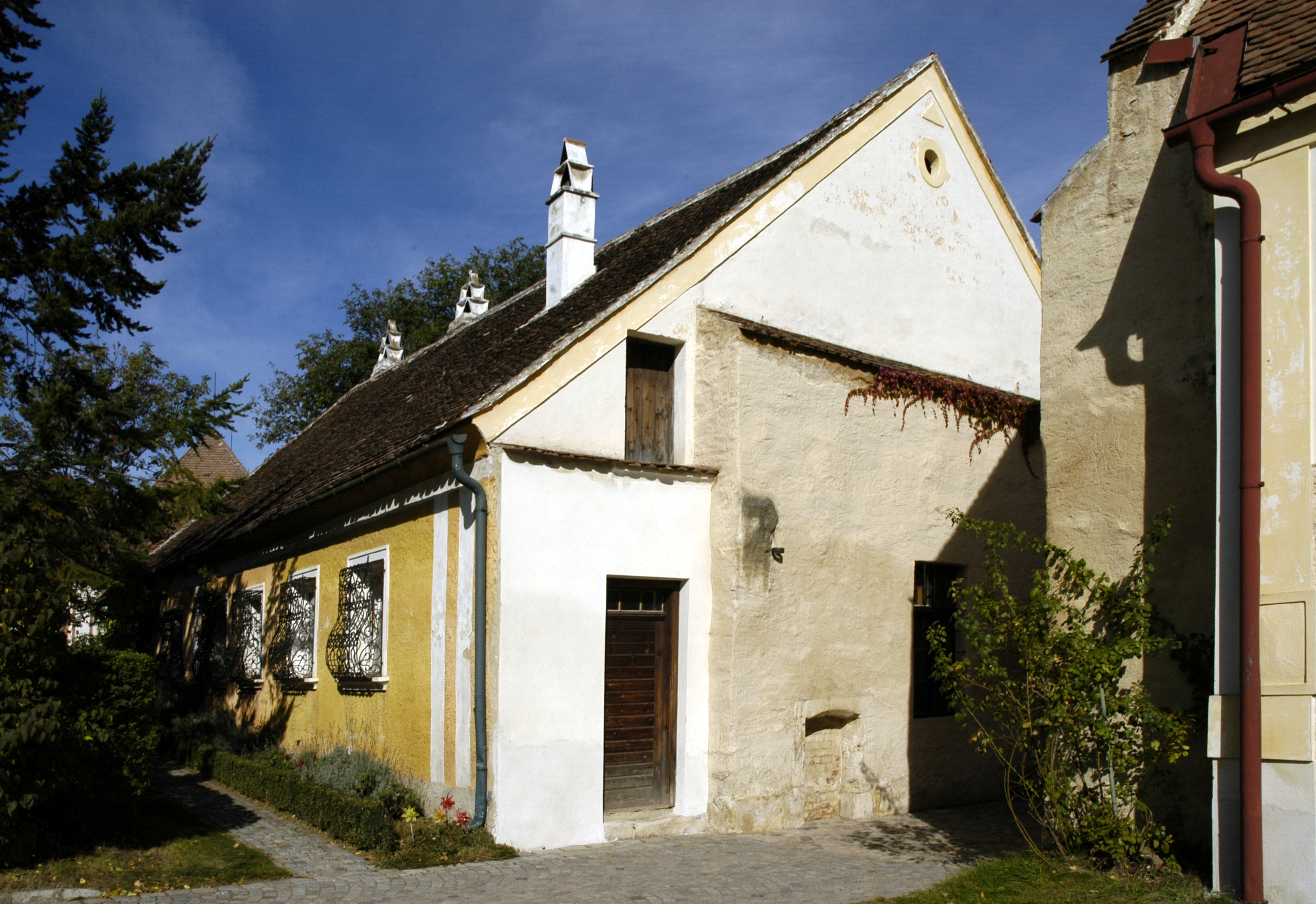 Schrattenthal - Schloss / Pförtnerhaus, ehem.Pfarrhof Dieses Bild wurde anlässlich des österreichischen Tags des Denkmals 2012 in Niederösterreich eingereicht.